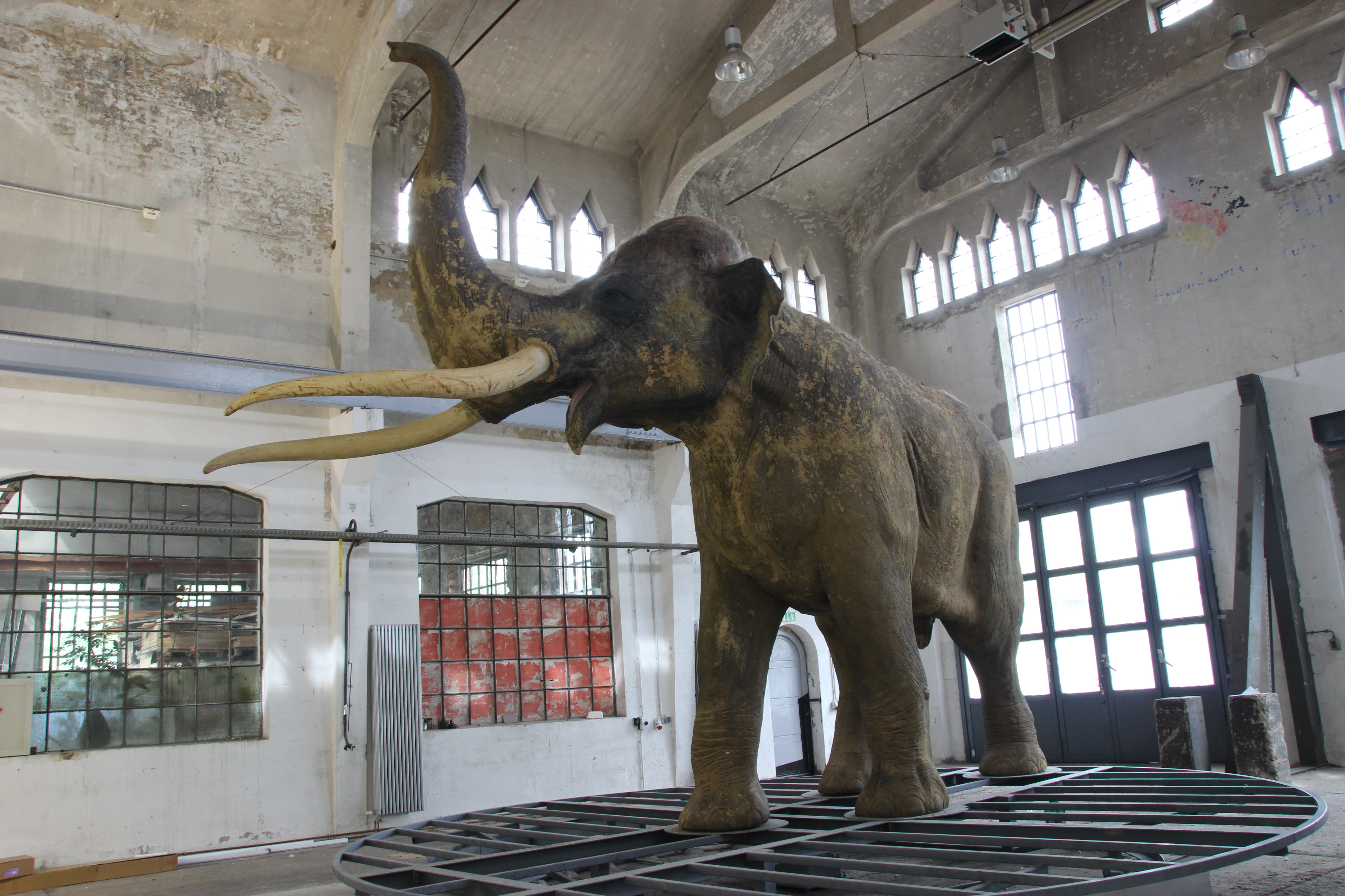 Waldelefant-Ausstellung in der Pfännerhall Braunsbedra